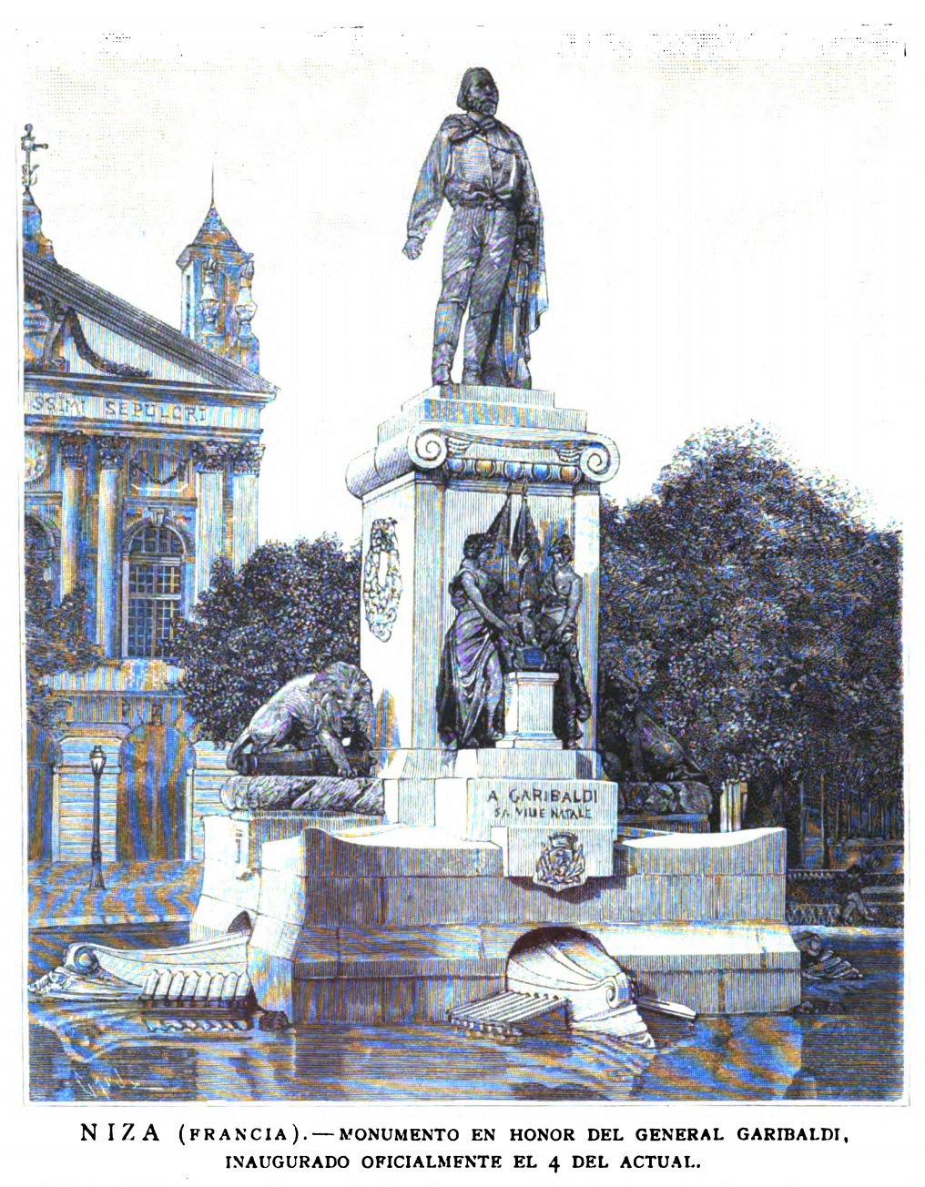 Niza (Francia). — Monumento en honor del general Garibaldi. Inaugurado oficialmente el 4 del actual.